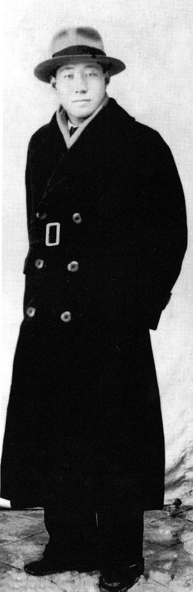 畢力格巴圖爾（1908年－1974年）又名趙璧城、圖穆洛甫夫、楊立登、王福元、趙子玉、周振，蒙古族，內蒙古土默特旗什蘭岱村（今屬呼和浩特市）人。中華民國及中華人民共和國政治人物。